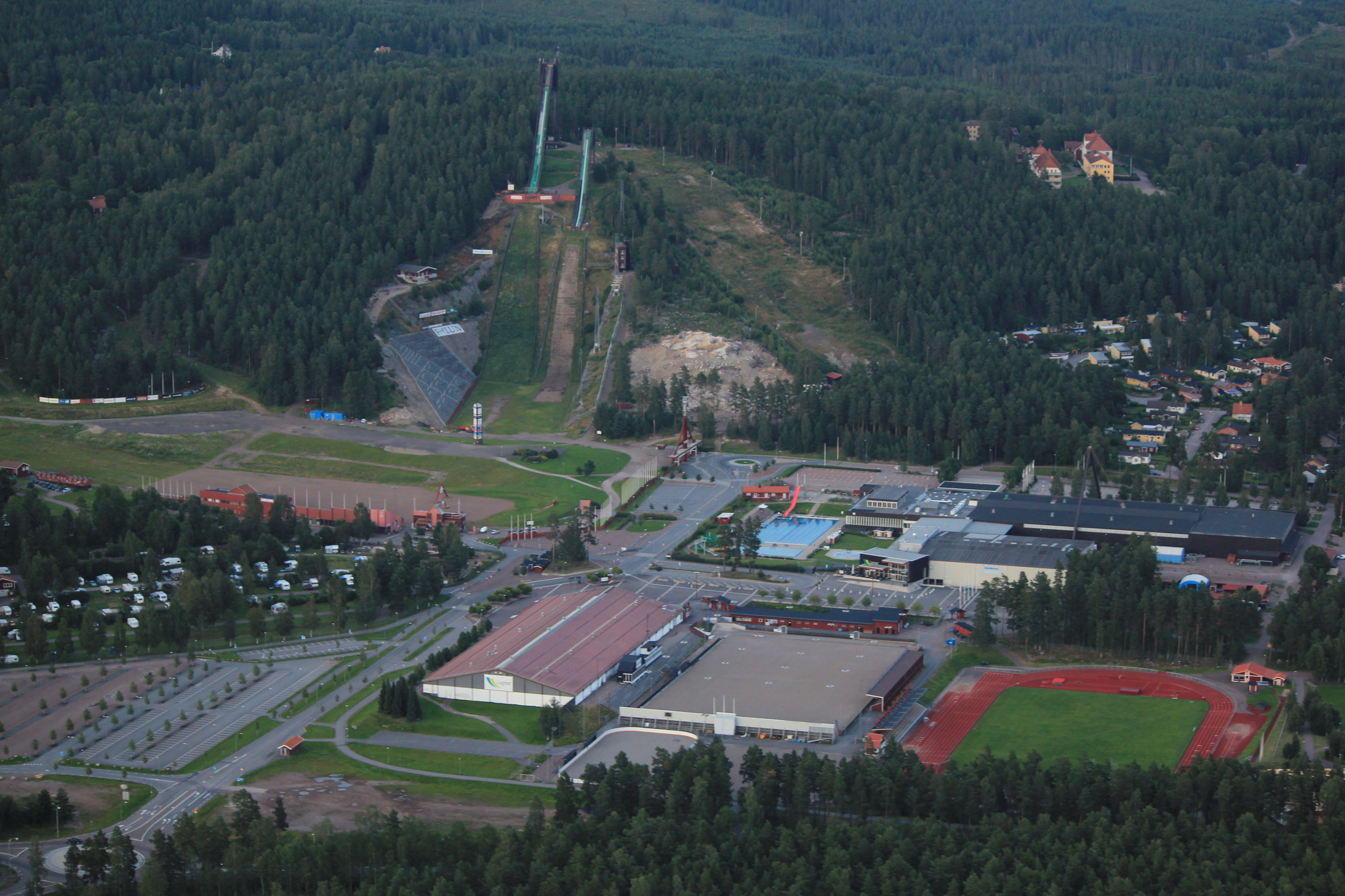 Flygfoto över Lugnet, Falun, Dalarnas län, Sverige This aerial photograph has been approved for publishing by the Swedish Armed Forces with the ID: FMTM 10 830:11043 This tag does not indicate the copyright status of the attached work. A normal copyright tag is still required. See Commons:Licensing for more information. English | svenska | +/−